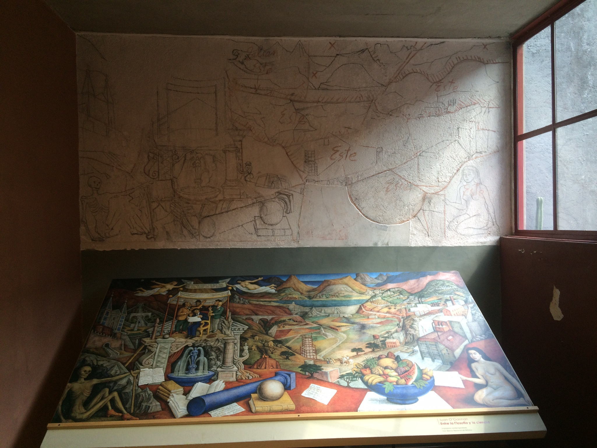 La obra mural lleva por título: Entre la filosofía y la ciencia hay bastante diferencia. Se encuentra en la casa Juan O'Gorman en el Museo Casa Estudio Diego Rivera y Frida Kahlo en San Ángel.